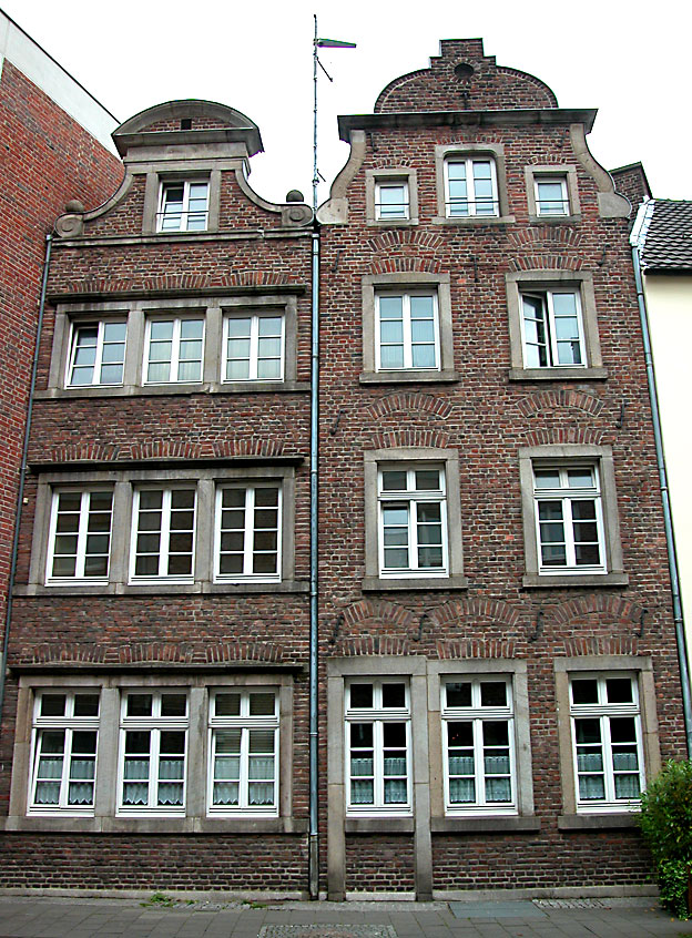 Akademiestraße, Düsseldorf-Altstadt